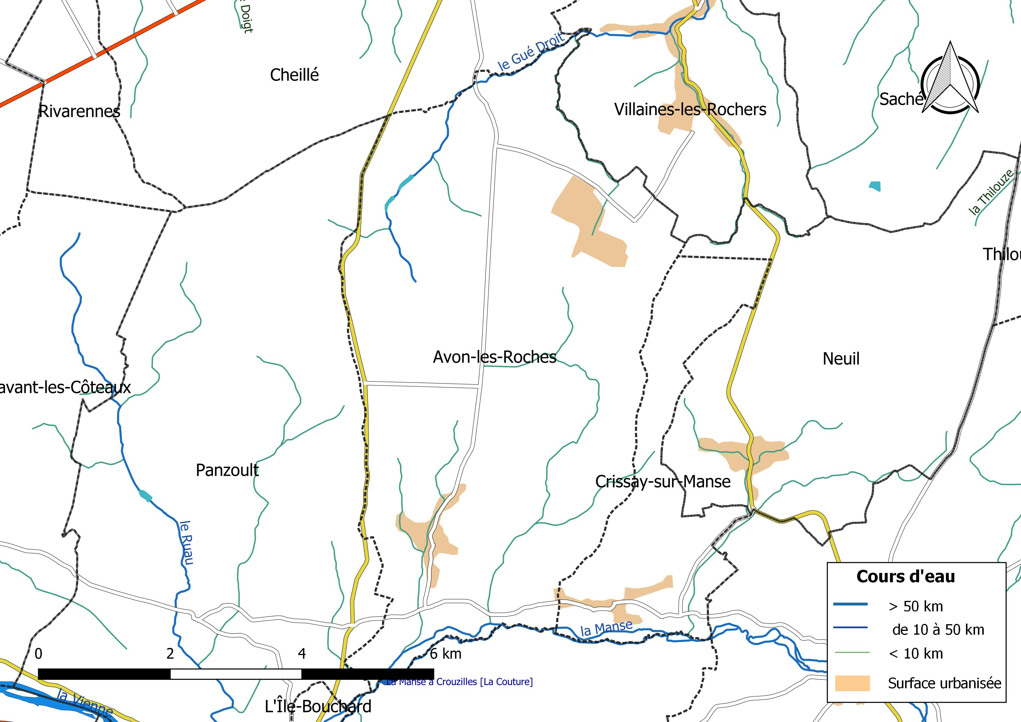 Carte du réseau hydrographique de la commune de Avon-les-Roches (France).